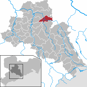 Roßwein in Saxony - district Mittelsachsen